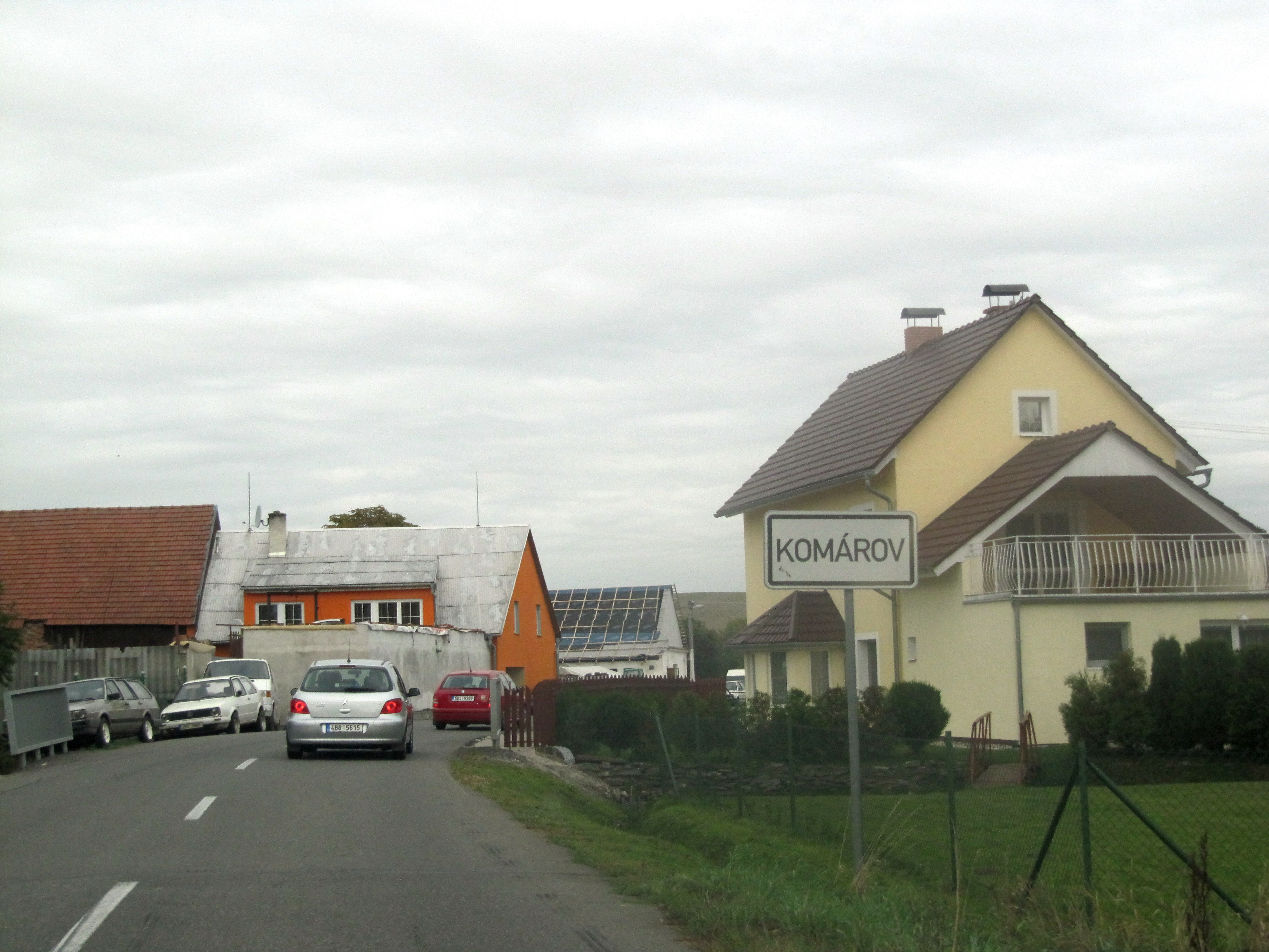 Komárov, příjezd od Šternberka